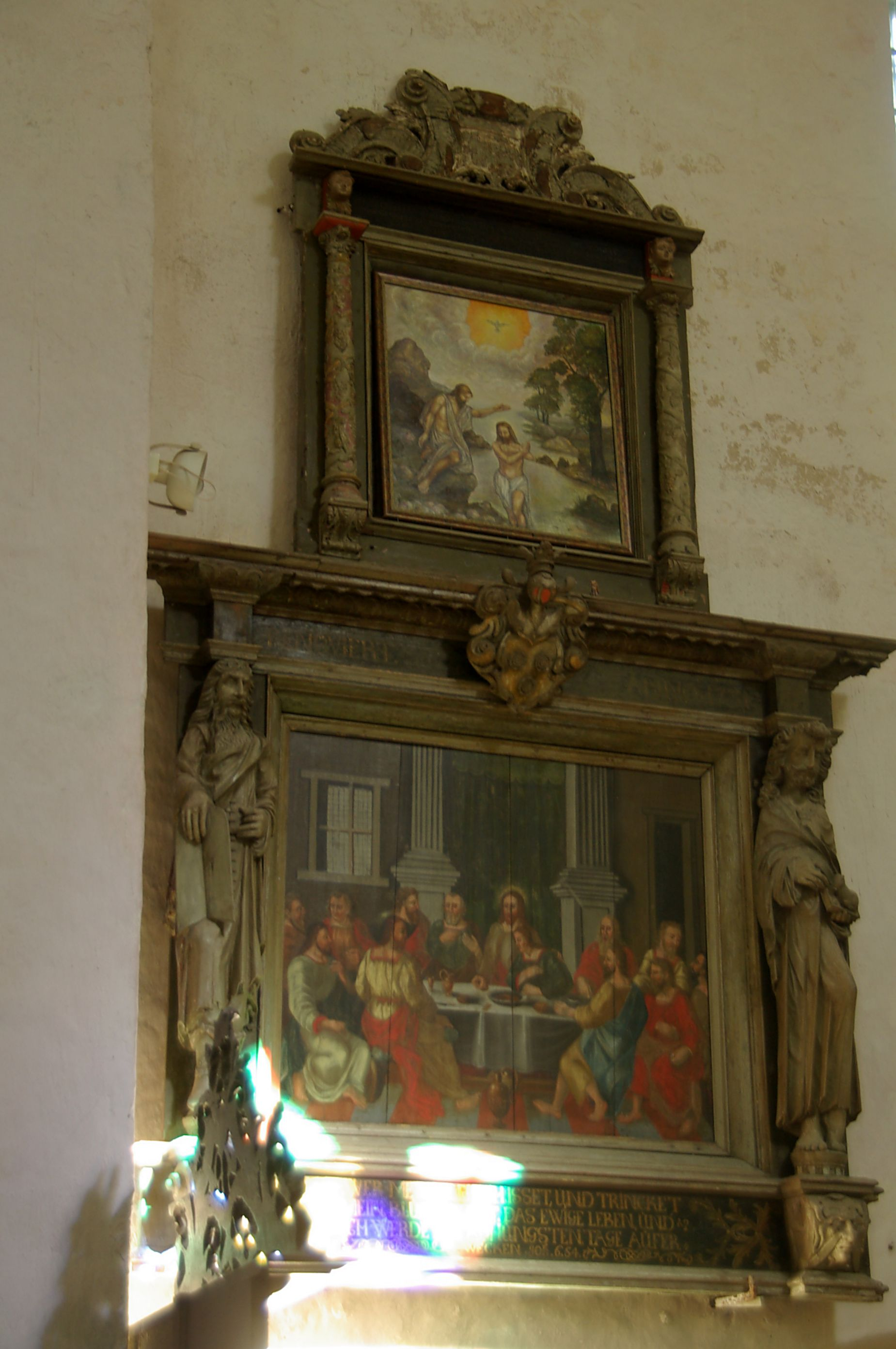 Järva maakond, Ambla vald, Ambla alevik Ambla kalmistu